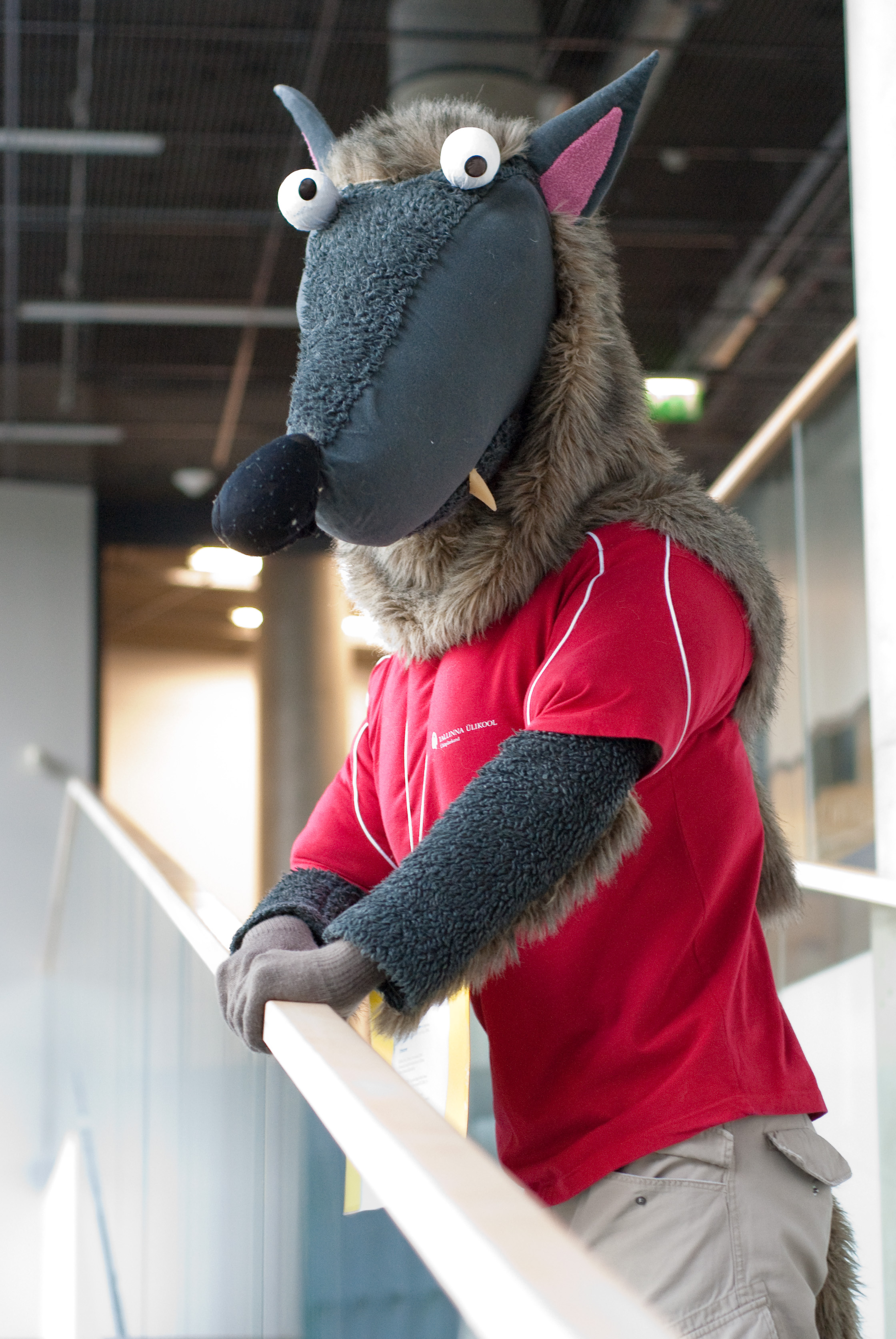 Tallinna Ülikooli maskott EksMati